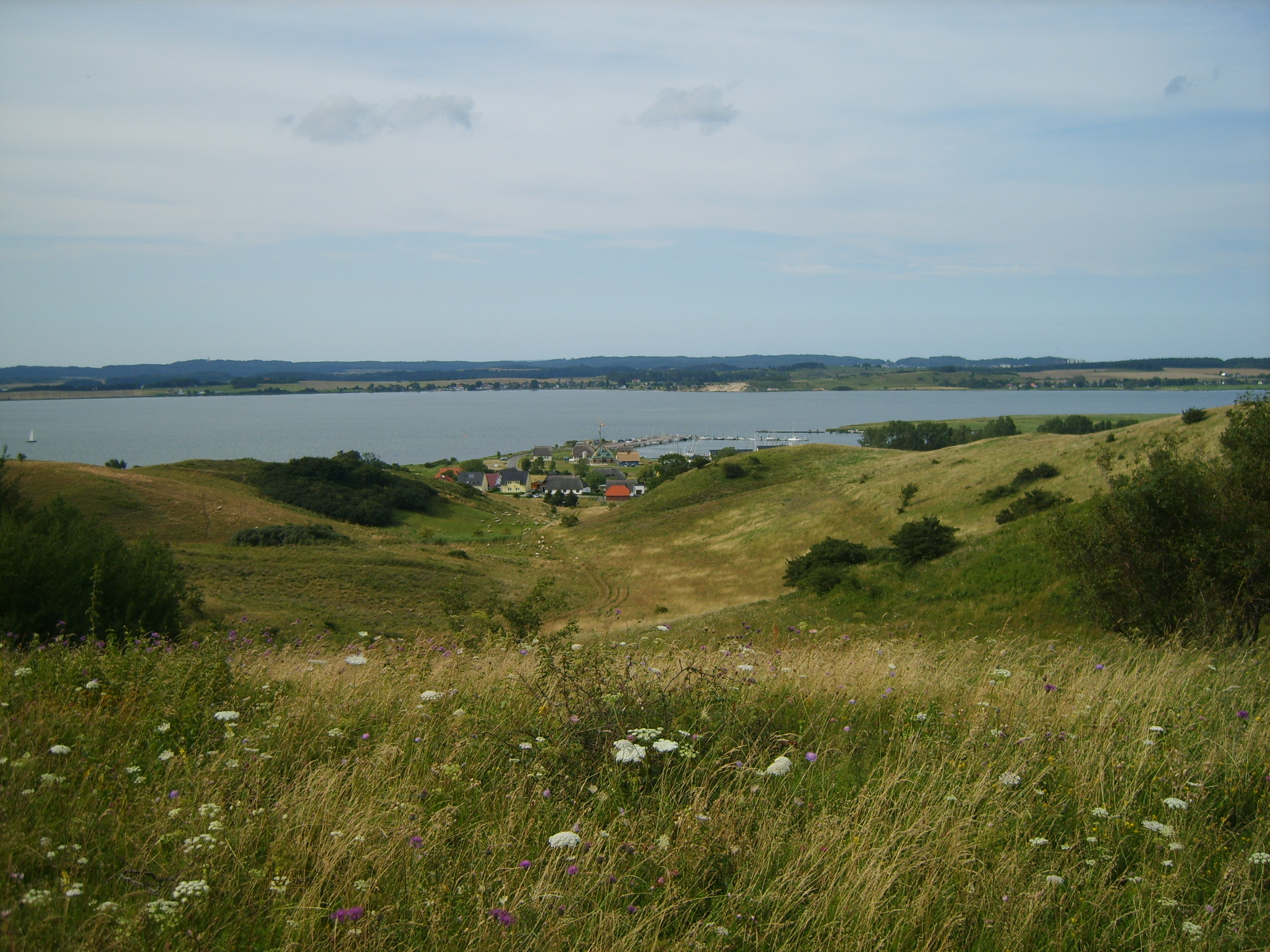 Blick durch Erosionsrinne vom Bakenberg auf Gager